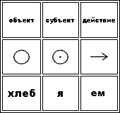 таблица порядка слов ОСВ